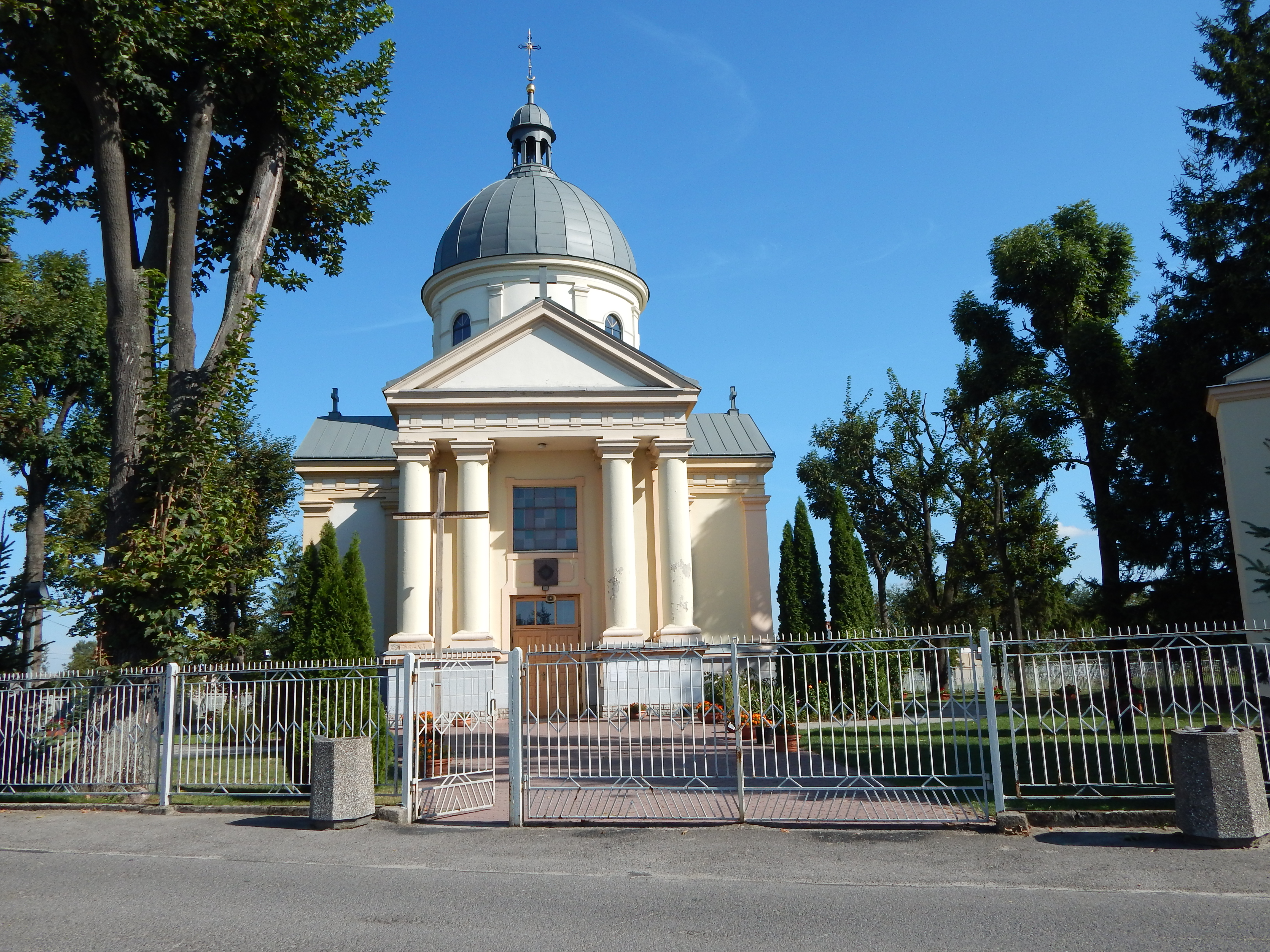 Stare Miasto, Kościół św. Andrzeja Boboli